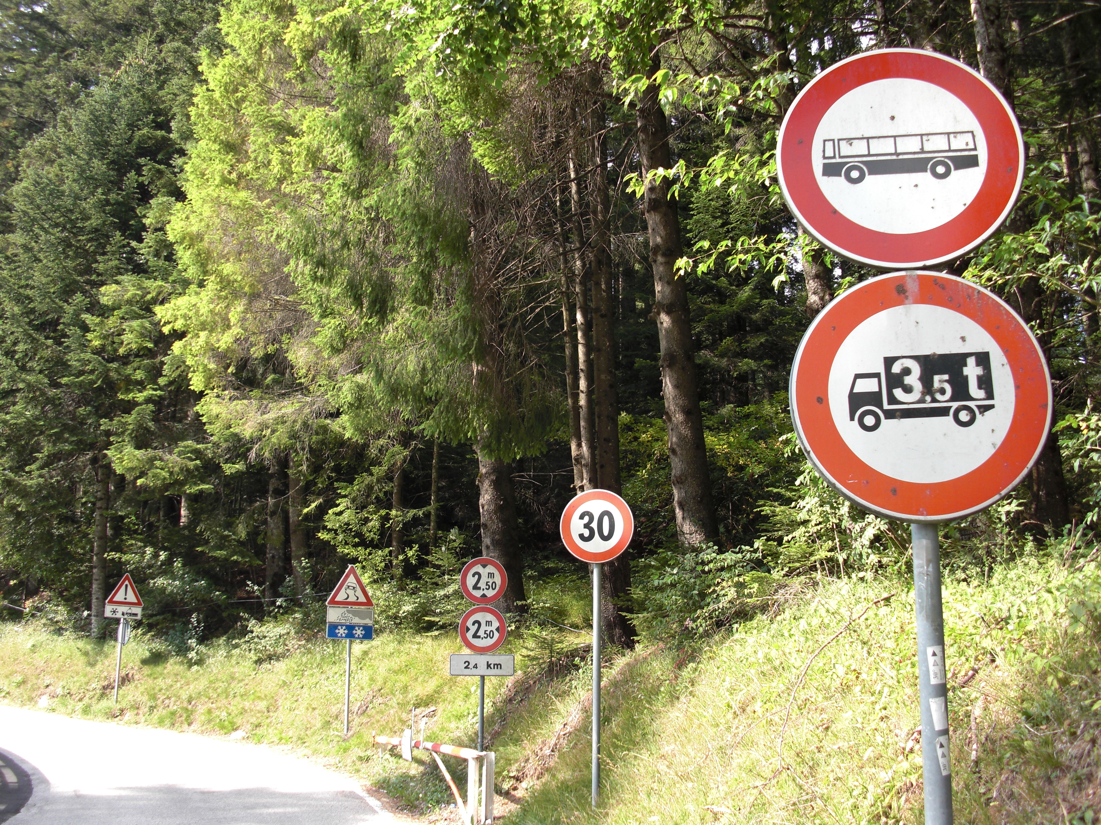 Verkehrsschilder am oberen Anfang der Kaiserjägerstraße